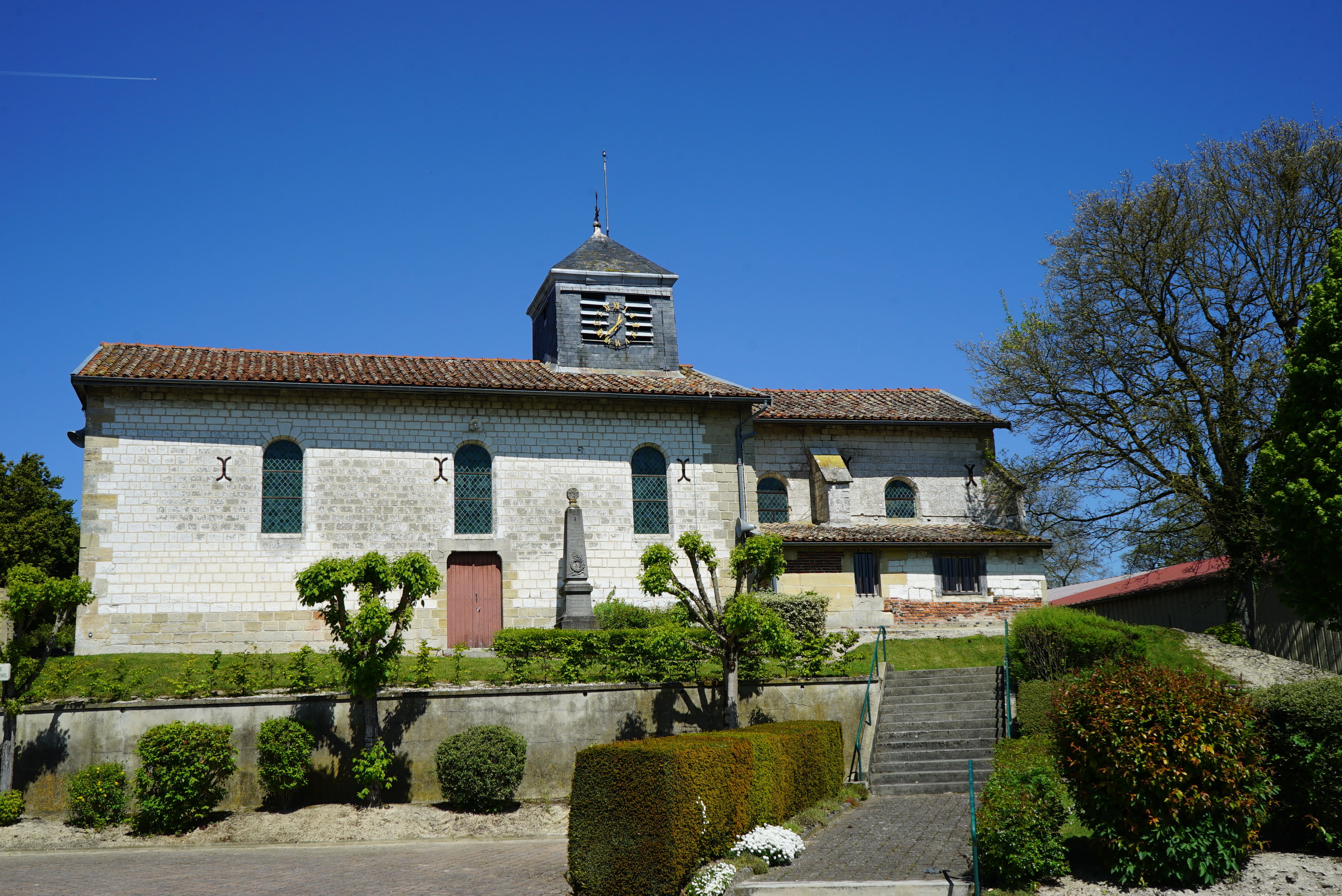 image de cf. titre.